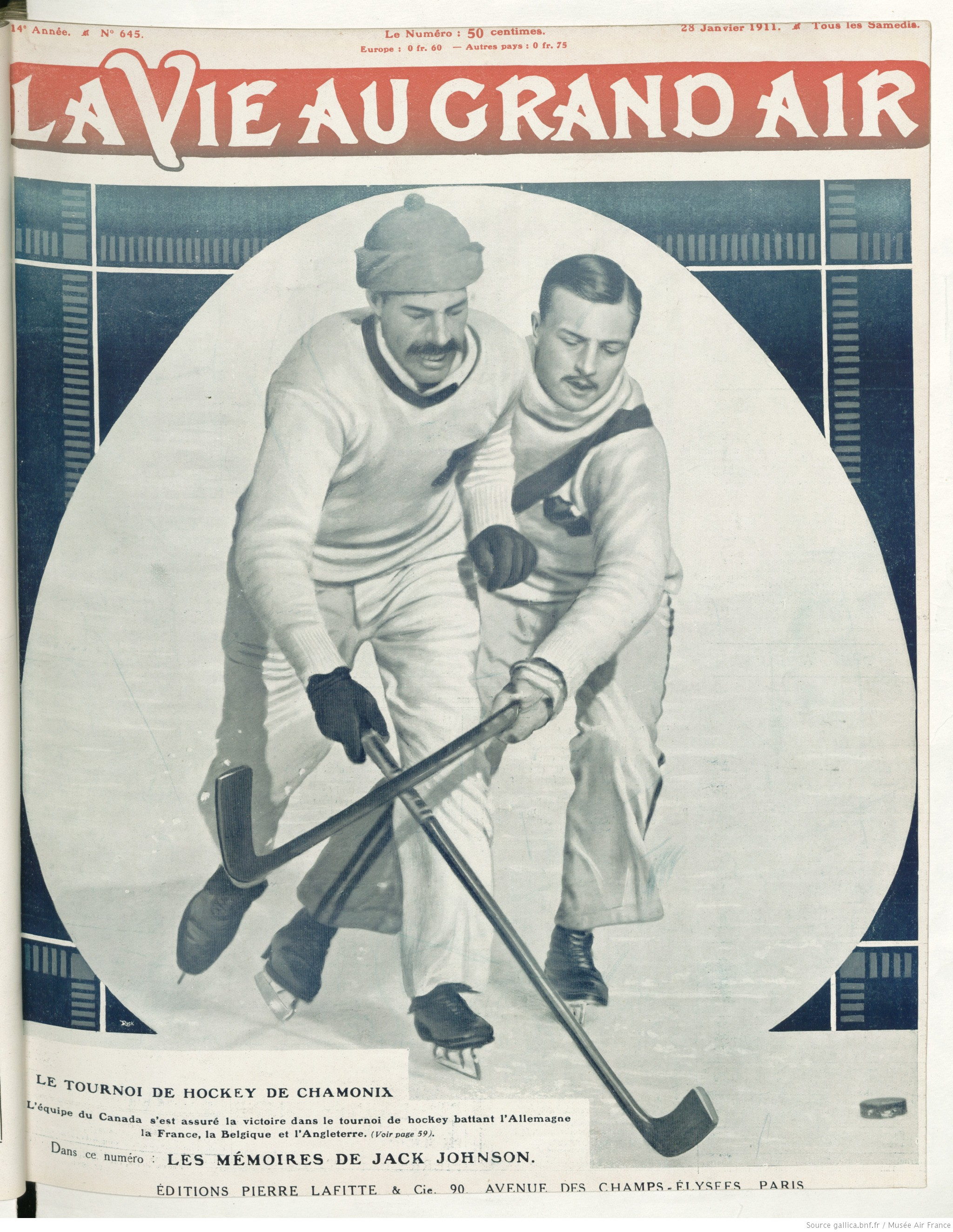 La Vie au grand air n° 645, du 28 janvier 1911. Sujet sur la couverture : TOURNOI DE HOCKEY DE CHAMONÏX L'Equipe du Canada s'est assuré la victoire dans le tournoi de hockey battant l'Allemagne, la France, la Belgique et l'Angleterre. Dans ce numéro : LES MÉMOIRES DE JACK JOHNSON.